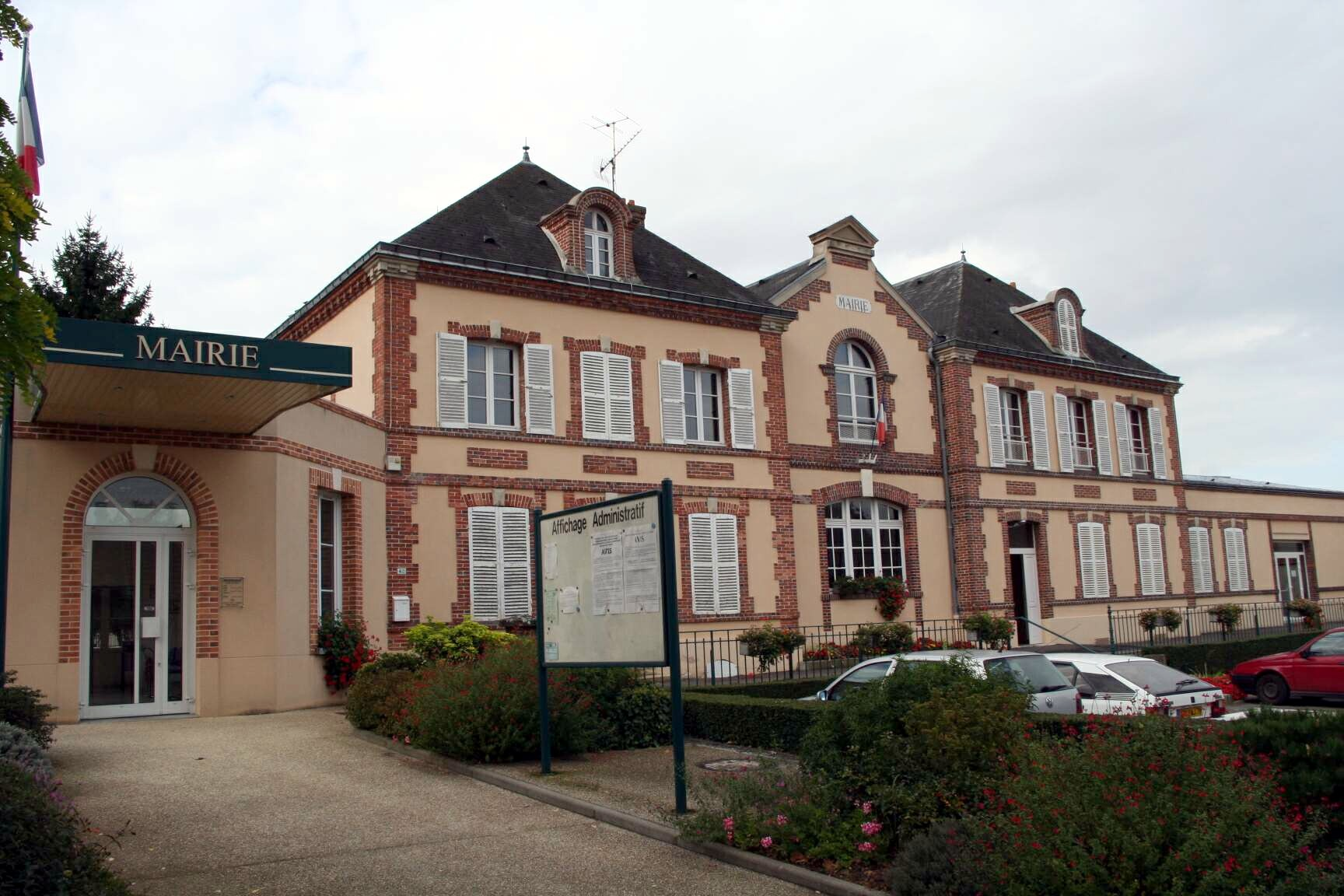 Mairie de Sonchamp - Yvelines (France)